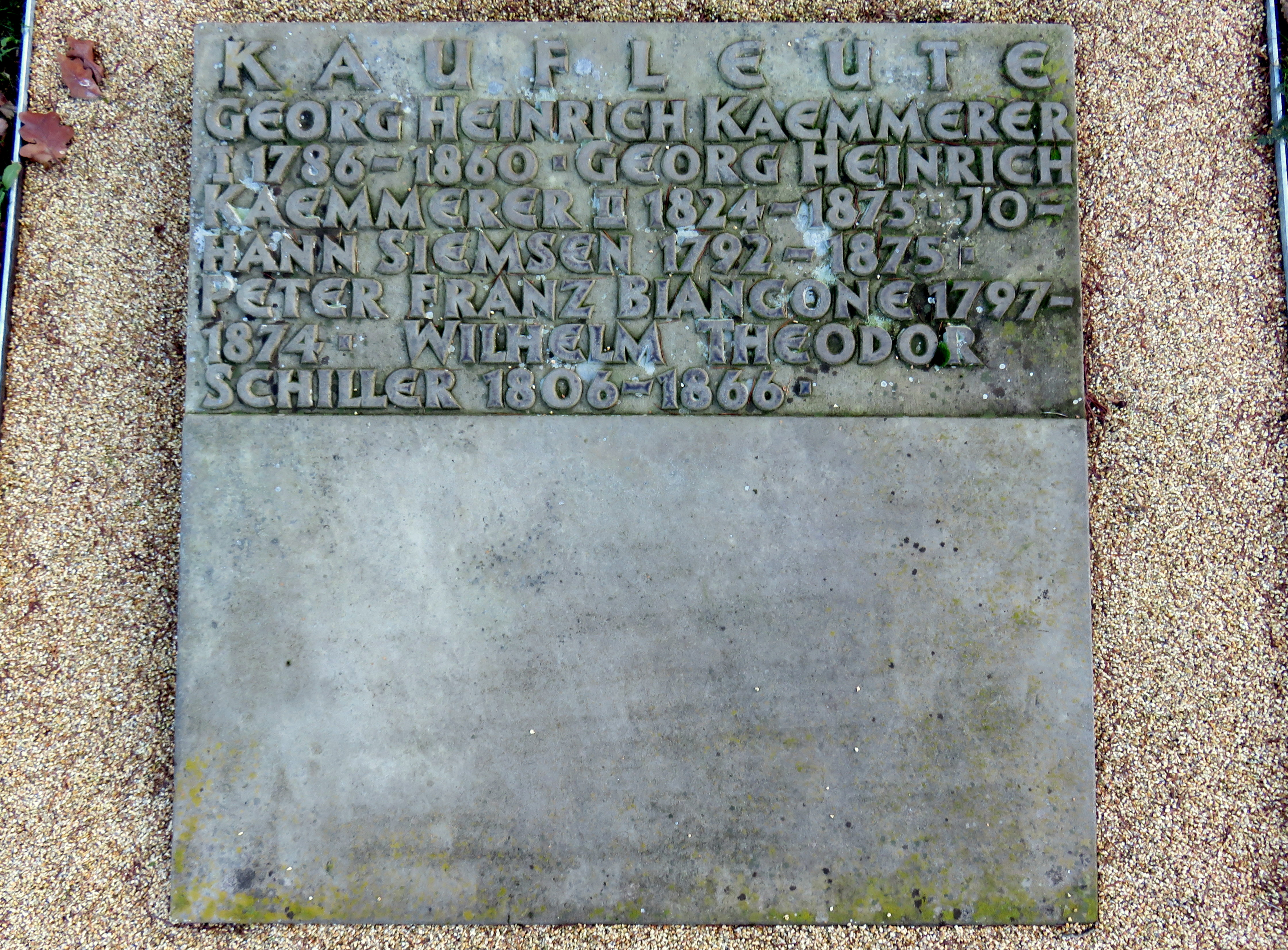 Sammelgrabplatte Kaufleute (II b) im Bereich des Althamburgischen Gedächtnisfriedhofs auf dem Hamburger Friedhof Ohlsdorf, zu Ehren von unter anderen Georg Heinrich Kaemmerer (1824-1875), Peter Franz Biancone.